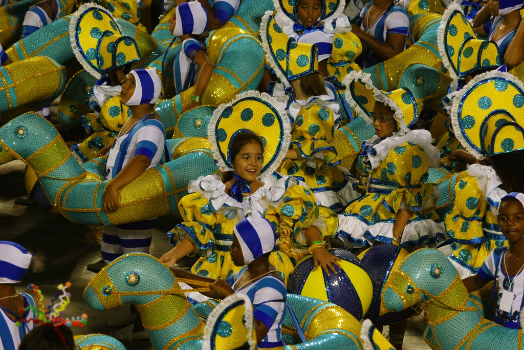 Desfiles na Marquês de Sapucaí 2009. Fotos Carlos Morel.